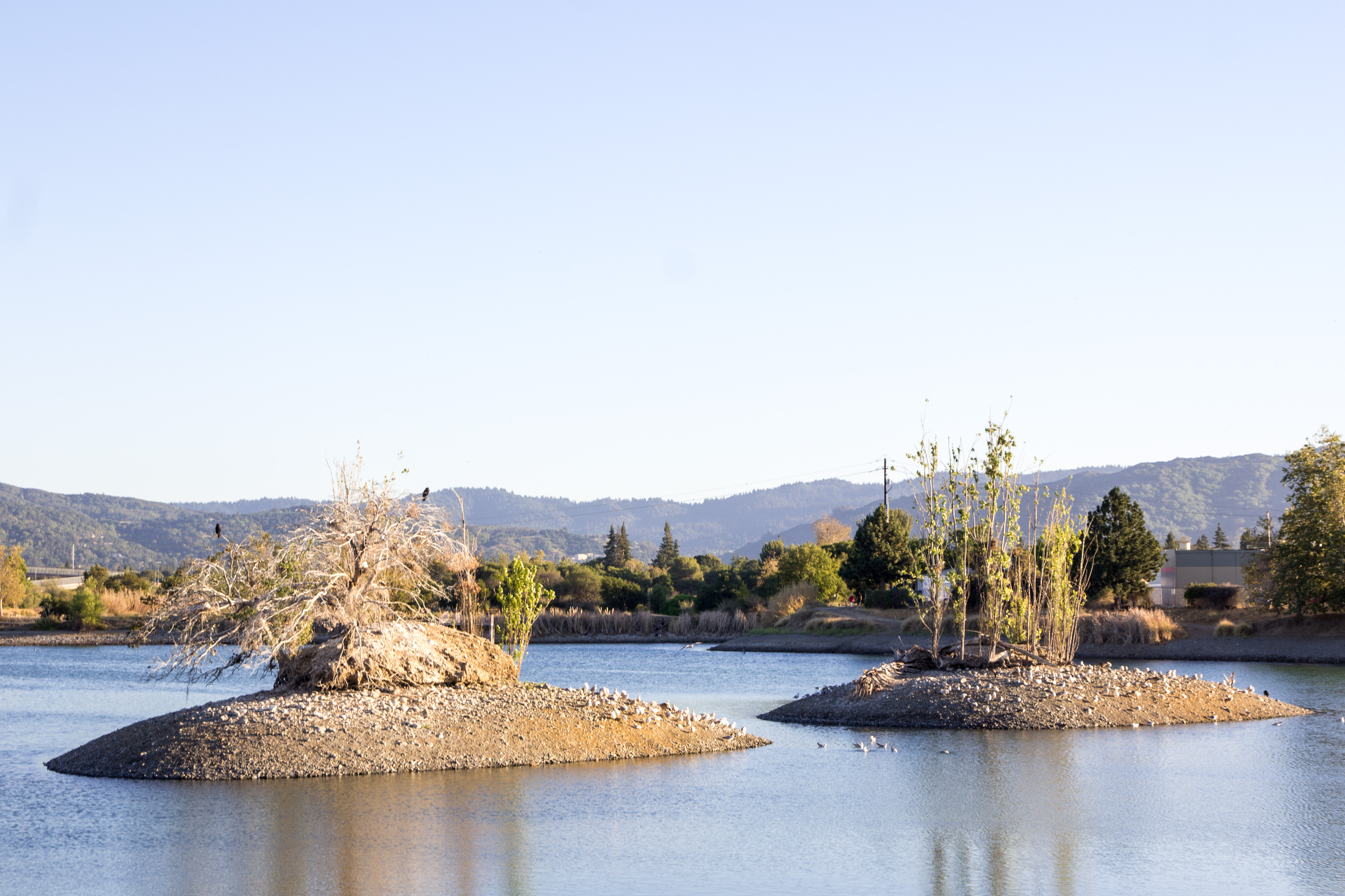 Camden Ponds in Los Gatos Creek County Park